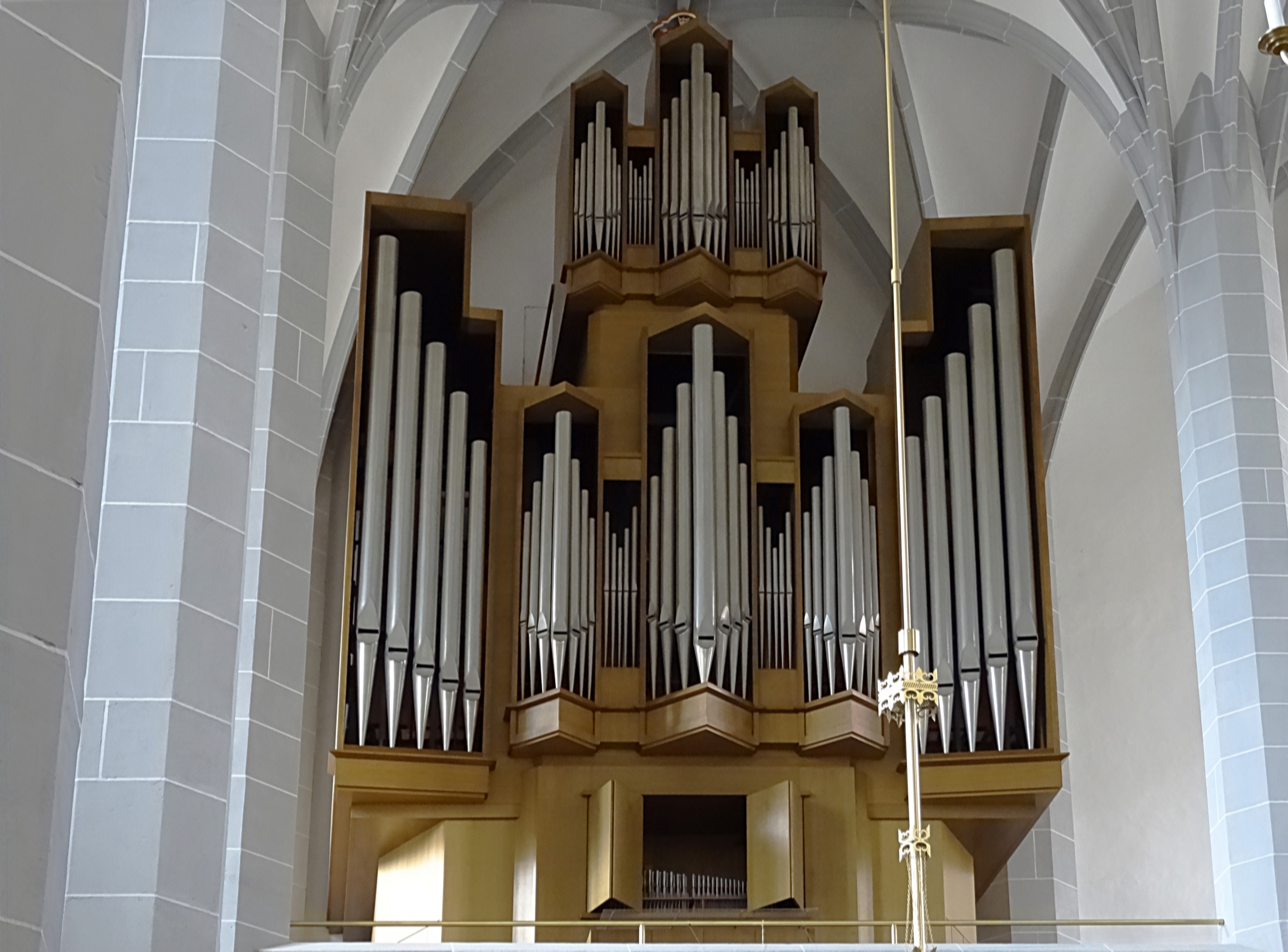 Orgel der Frauenkirche (Görlitz) von A. Schuster & Sohn, Zittau (1977, IIIP/34)